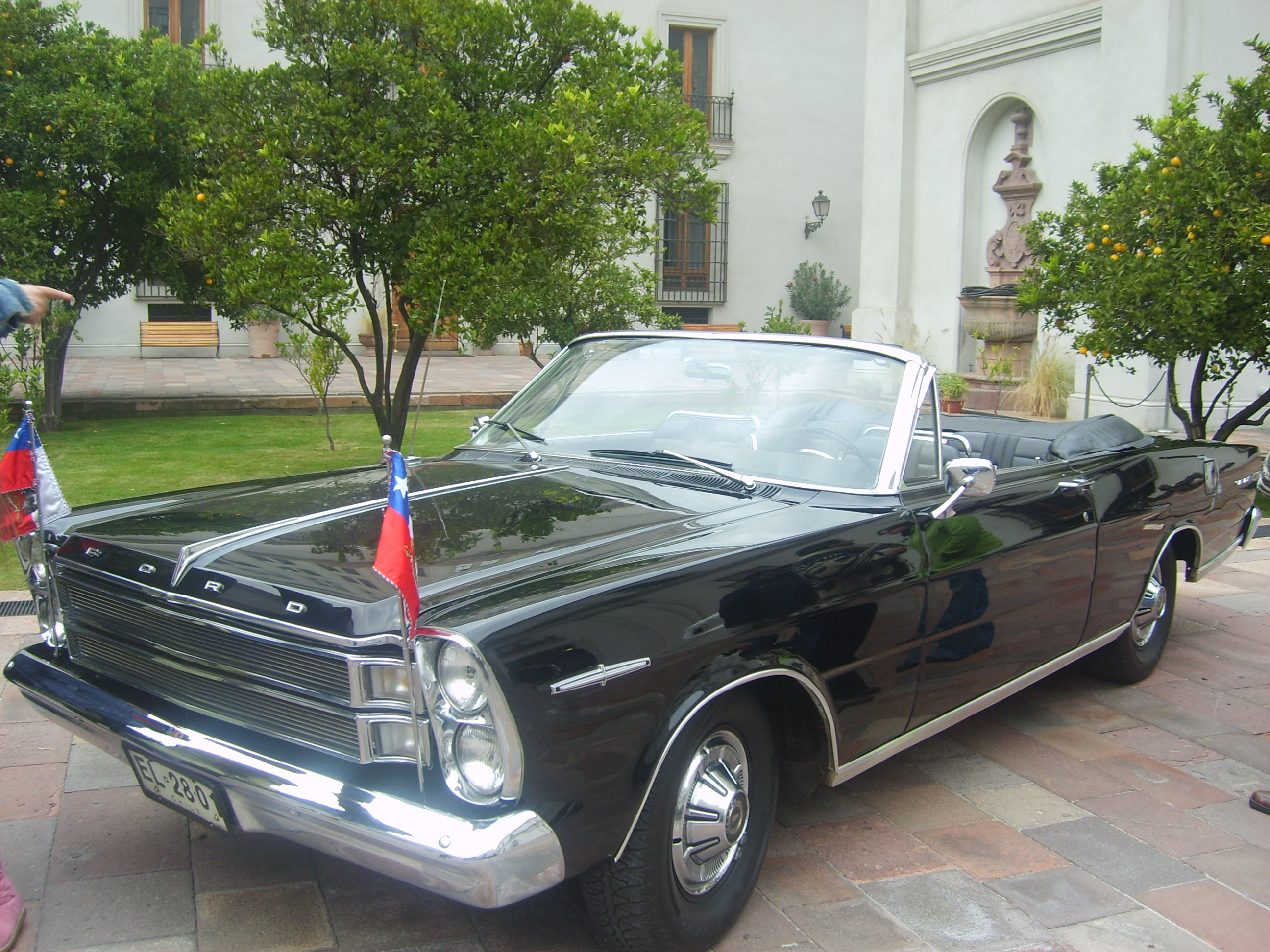 Fotografía del Ford Galaxie 500 XL de 1966 Donado por la Reina Isabel II, usado como vehiculo oficial de la República de Chile